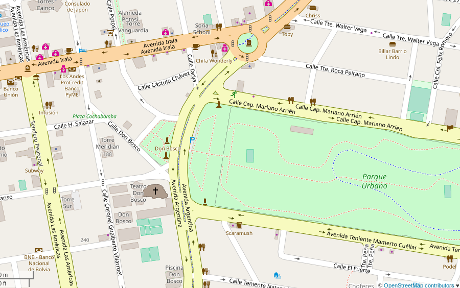 Captura de la ubicación en Openstreetmap. -17.79332, -63.17317